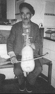 Foto personal, sacada en la vivienda de Pedro Madrid